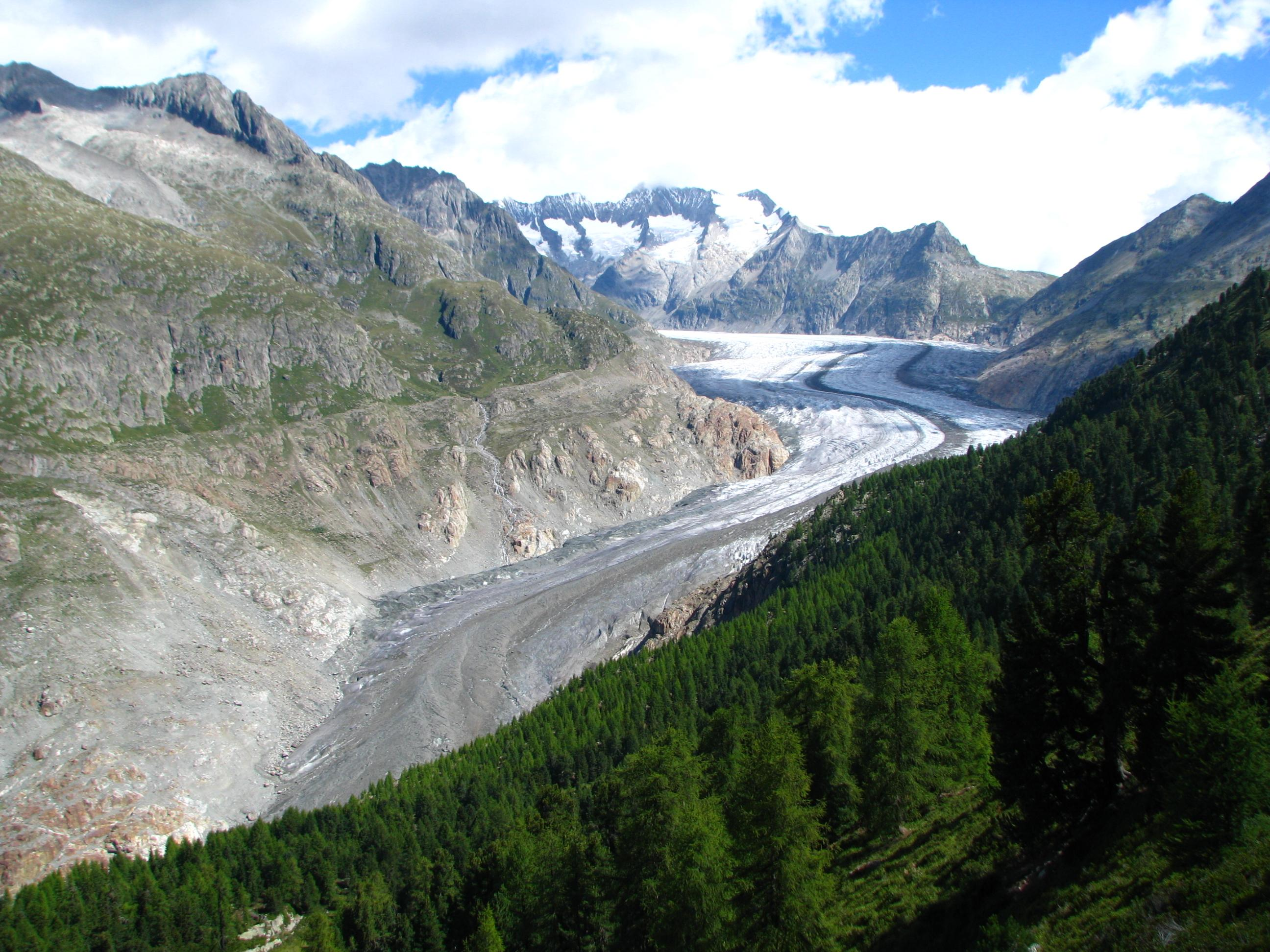 Der Aletschwald thront oberhalb des Aletschgletschers. Im Hintergrund die Wannenhörner (bis 3906 m).